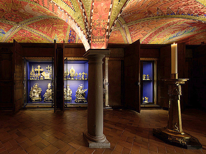 Raumansicht